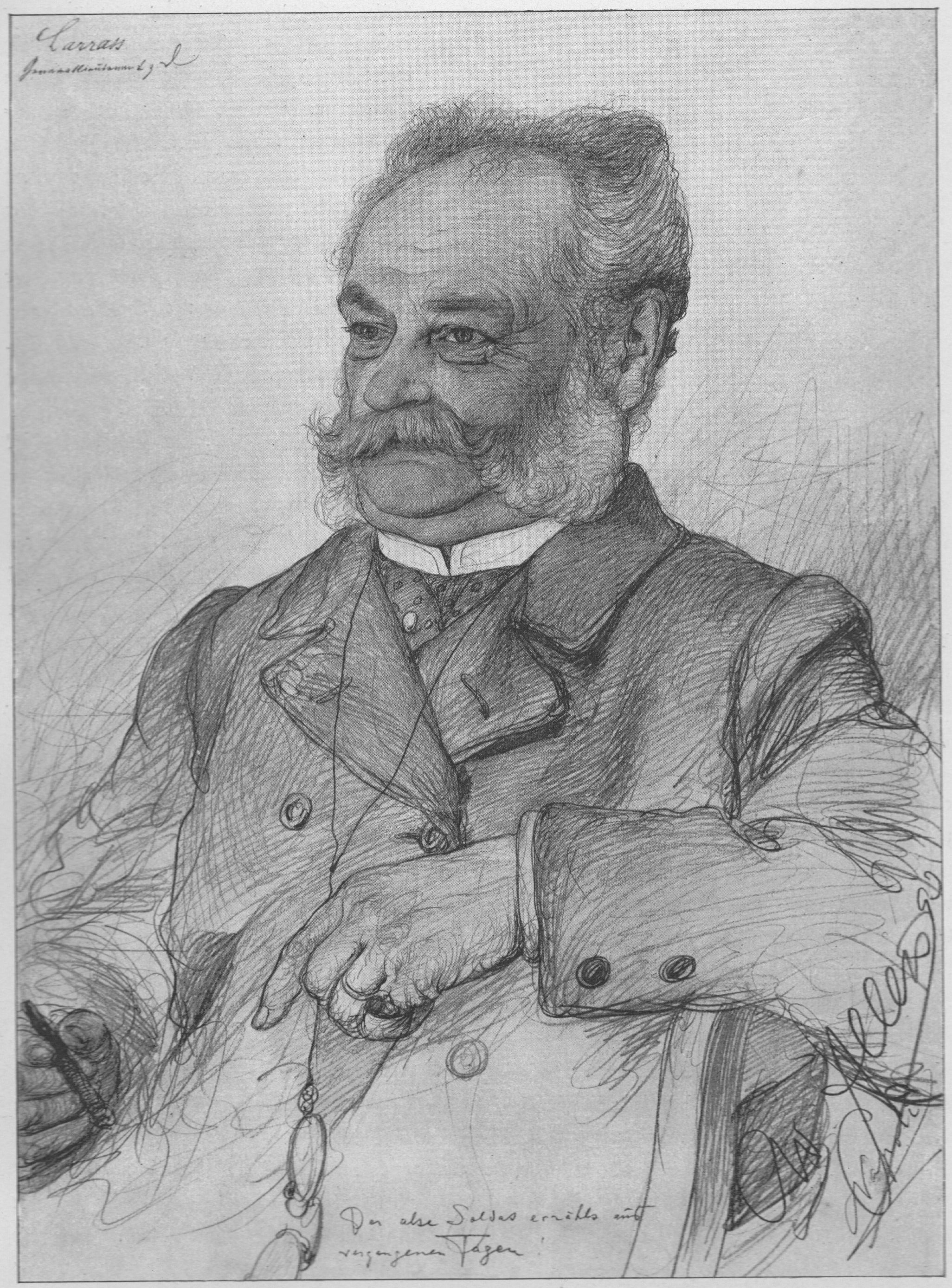 Generalleutnant z.D. Johannes Anton Larraß 1893 in Neapel. Bildunterschrift "Der alte Soldat erzählt aus vergangenen Tagen". Diese Zeichnung wurde auf der großen Allers-Auktion in Aachen im Jahr 1919 mit der Katalognummer 885 versteigert.